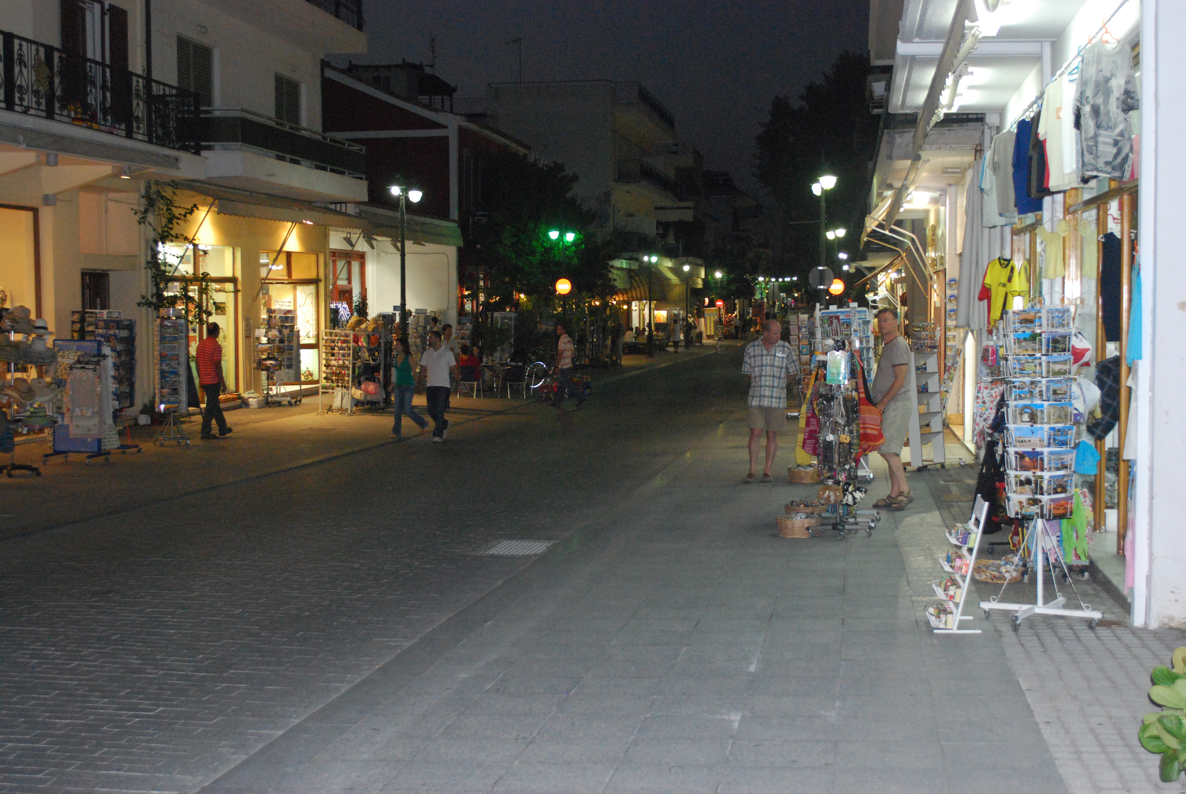 Rue à Olympie.